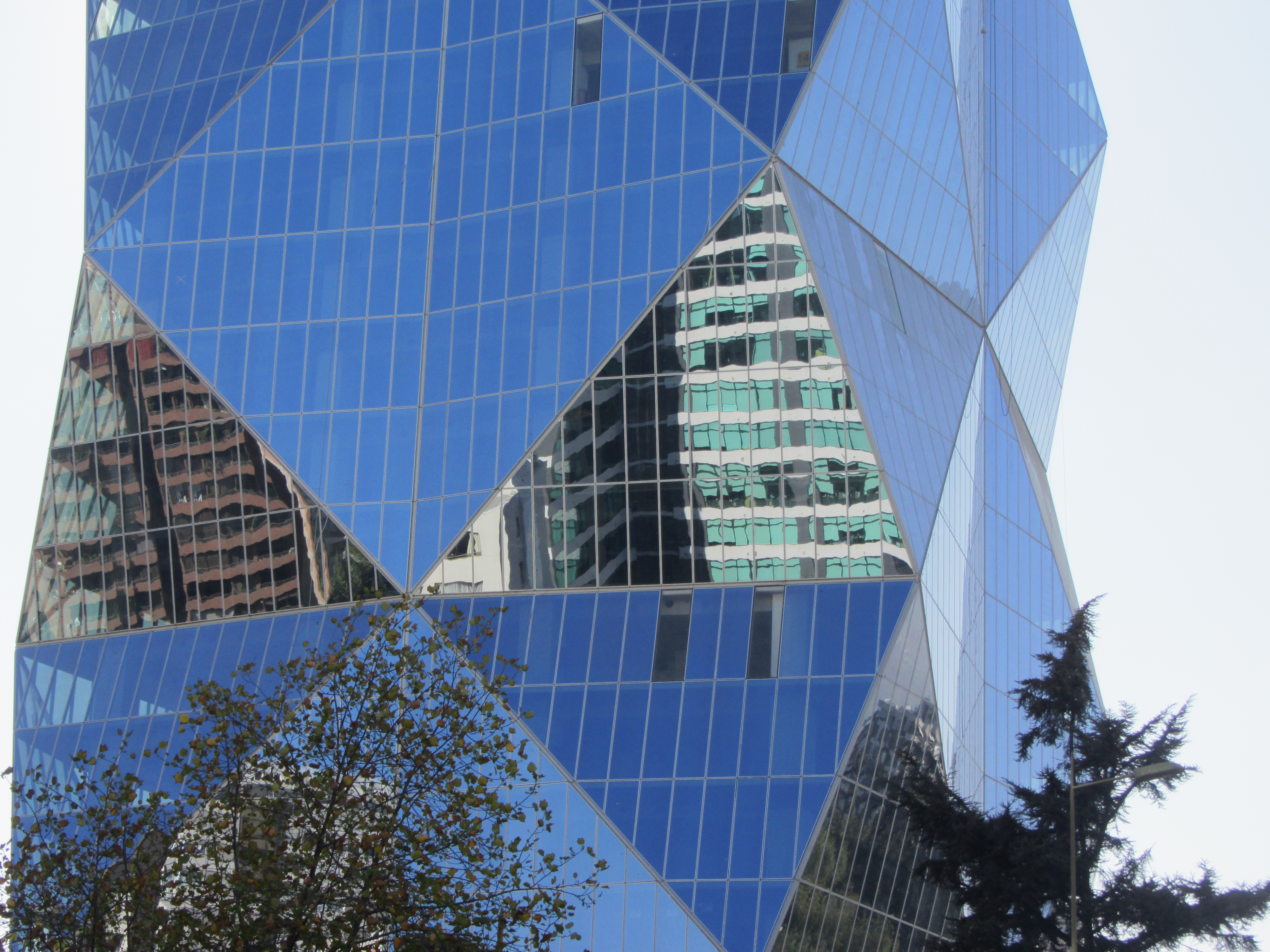 Edificio Génesis (detalle), arquitecto Gustavo Krefft; avenida Apoquindo, Las Condes, Santiago de Chile